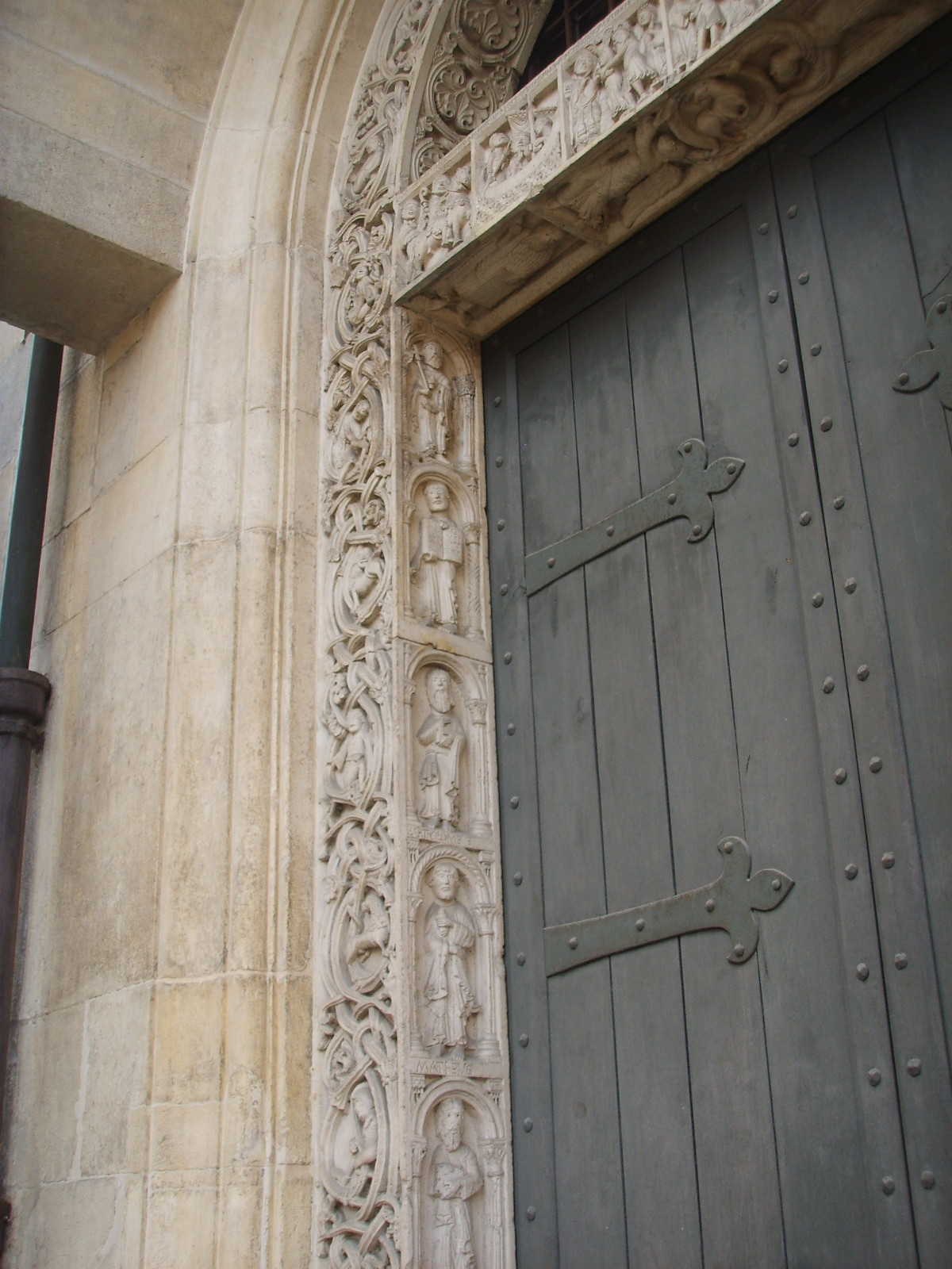 duomo di modena